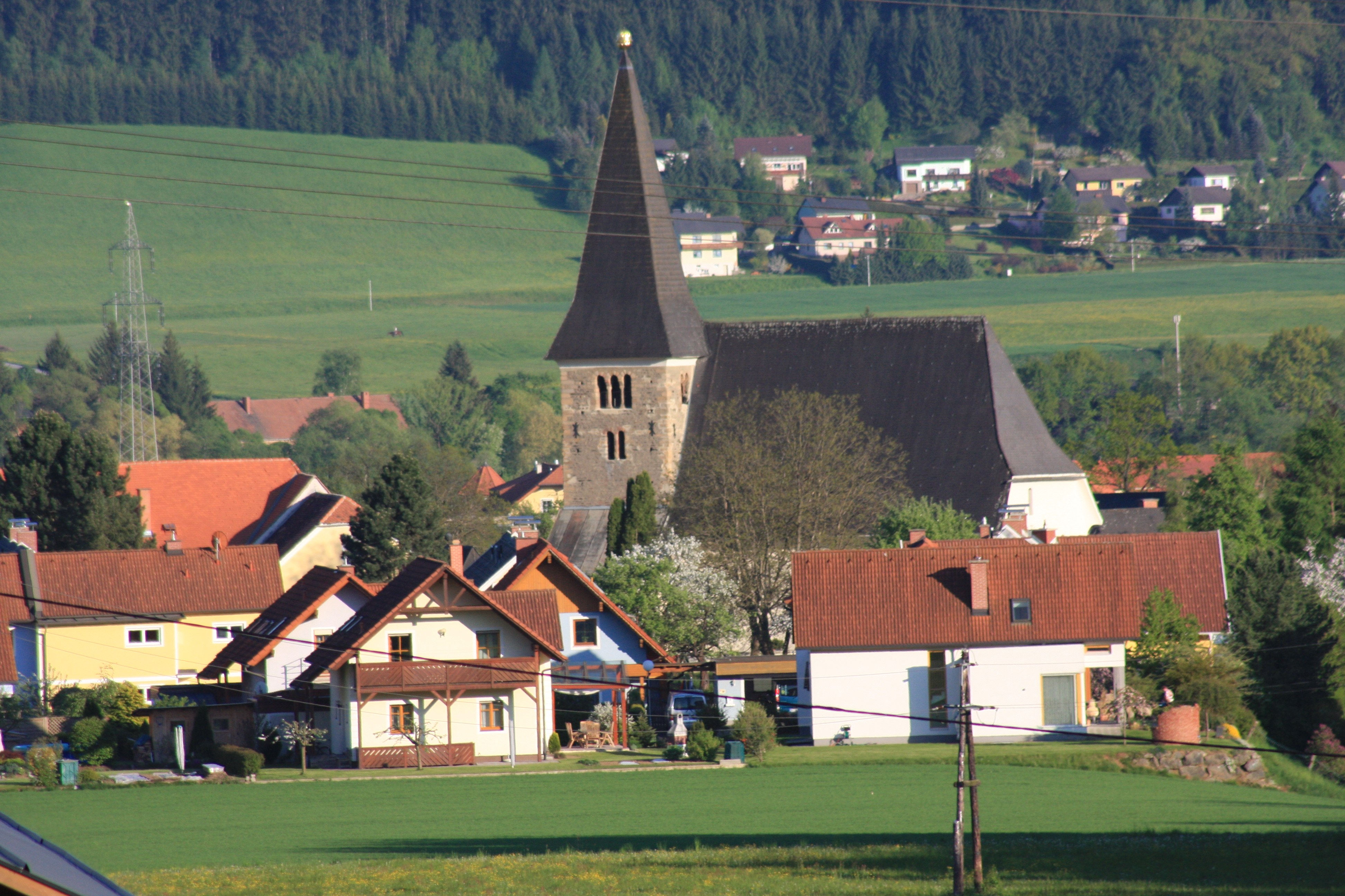 Blick auf Kobenz